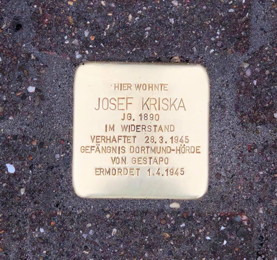 Josef Kriska, 2019